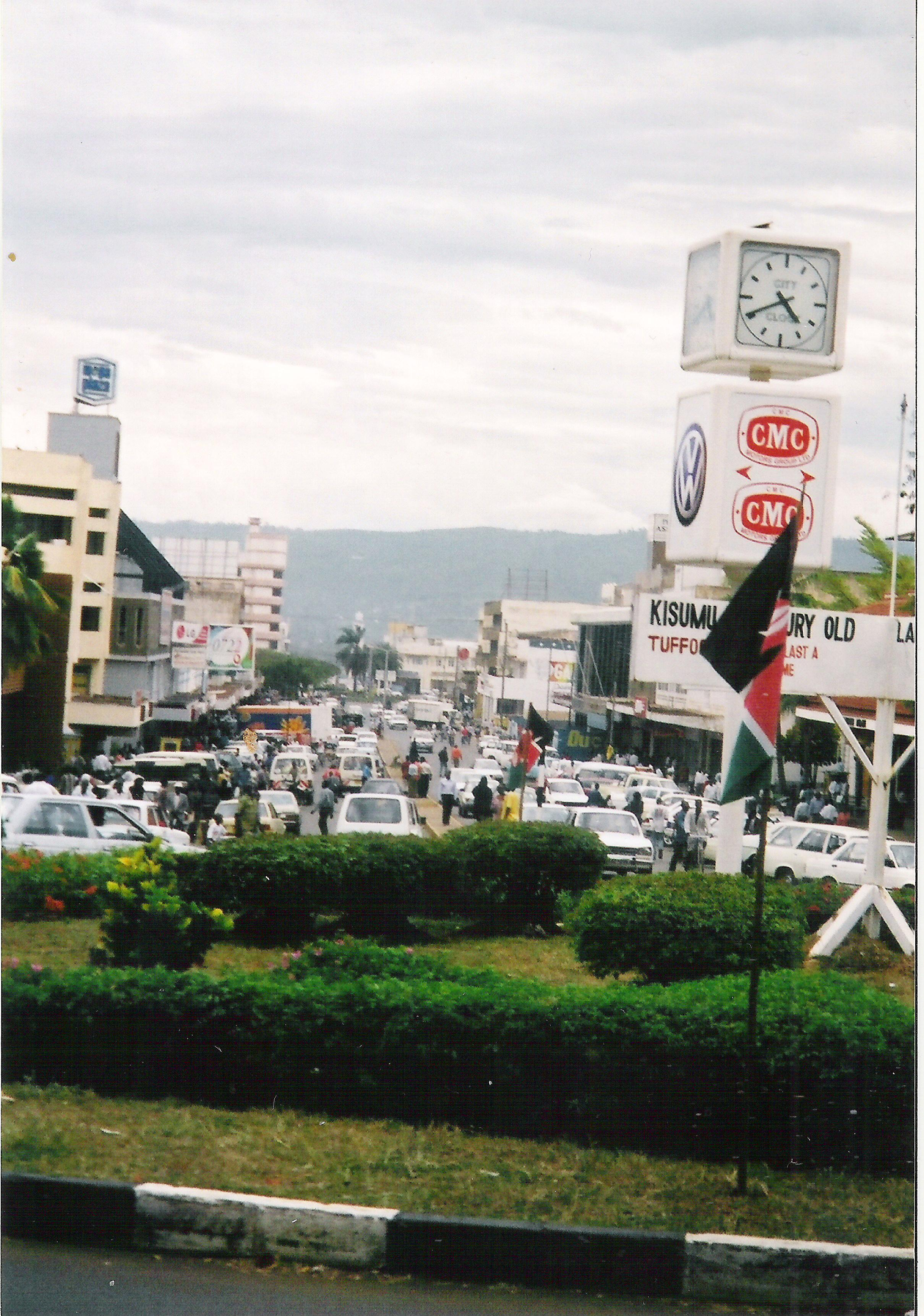 Kenya - Kisumu - Oginga Odinga street avec la "clock tower" dans le fond